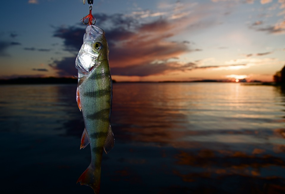 Perch from Mälaren